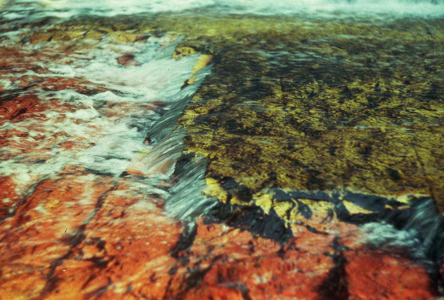 Quebrada de Jaspe en La Gran Sabana, estado Bolívar, Venezuela.